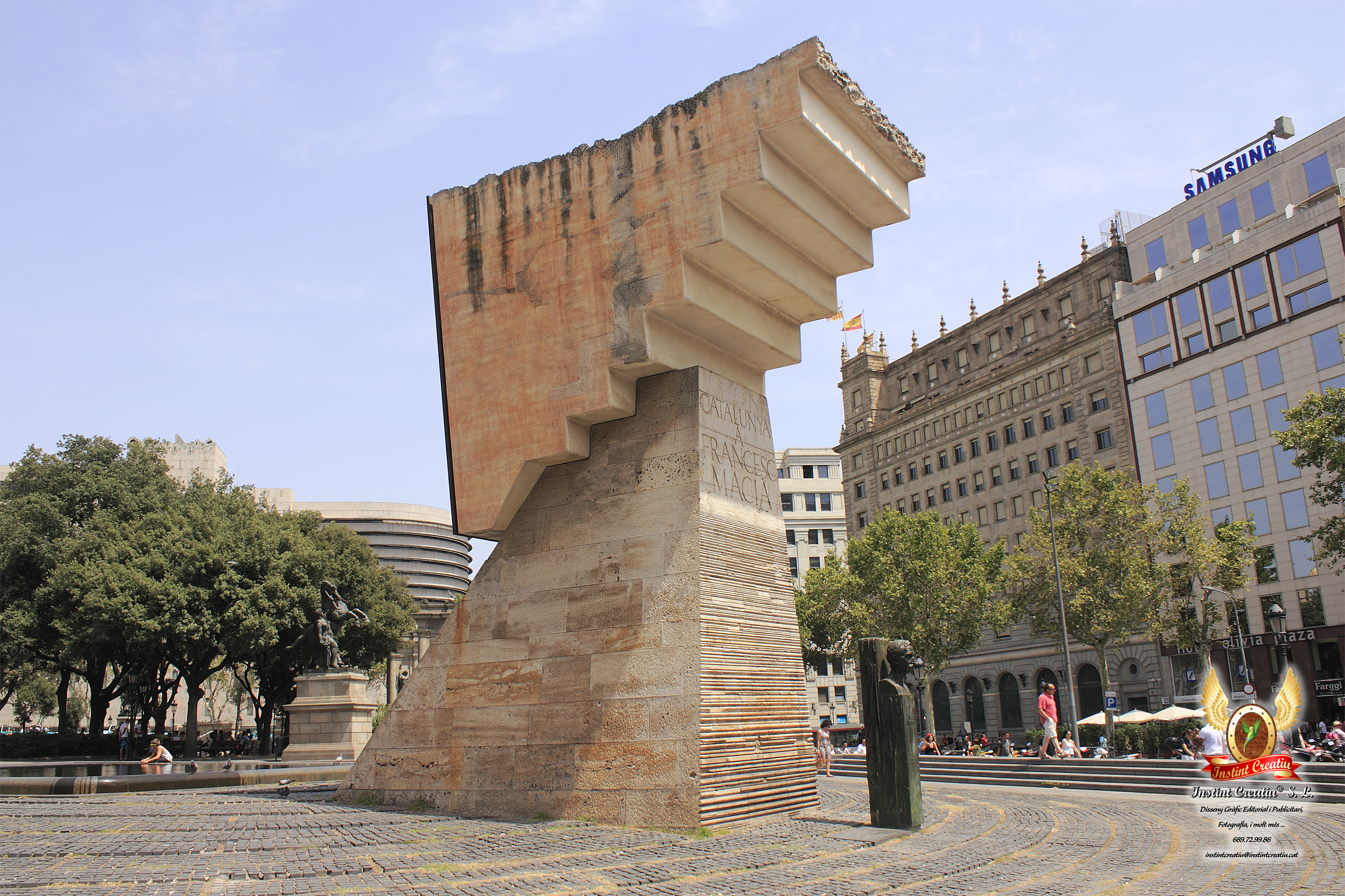 Catalunya a Francesc Macià (Josep Maria Subirachs). Pl. Catalunya (Barcelona)